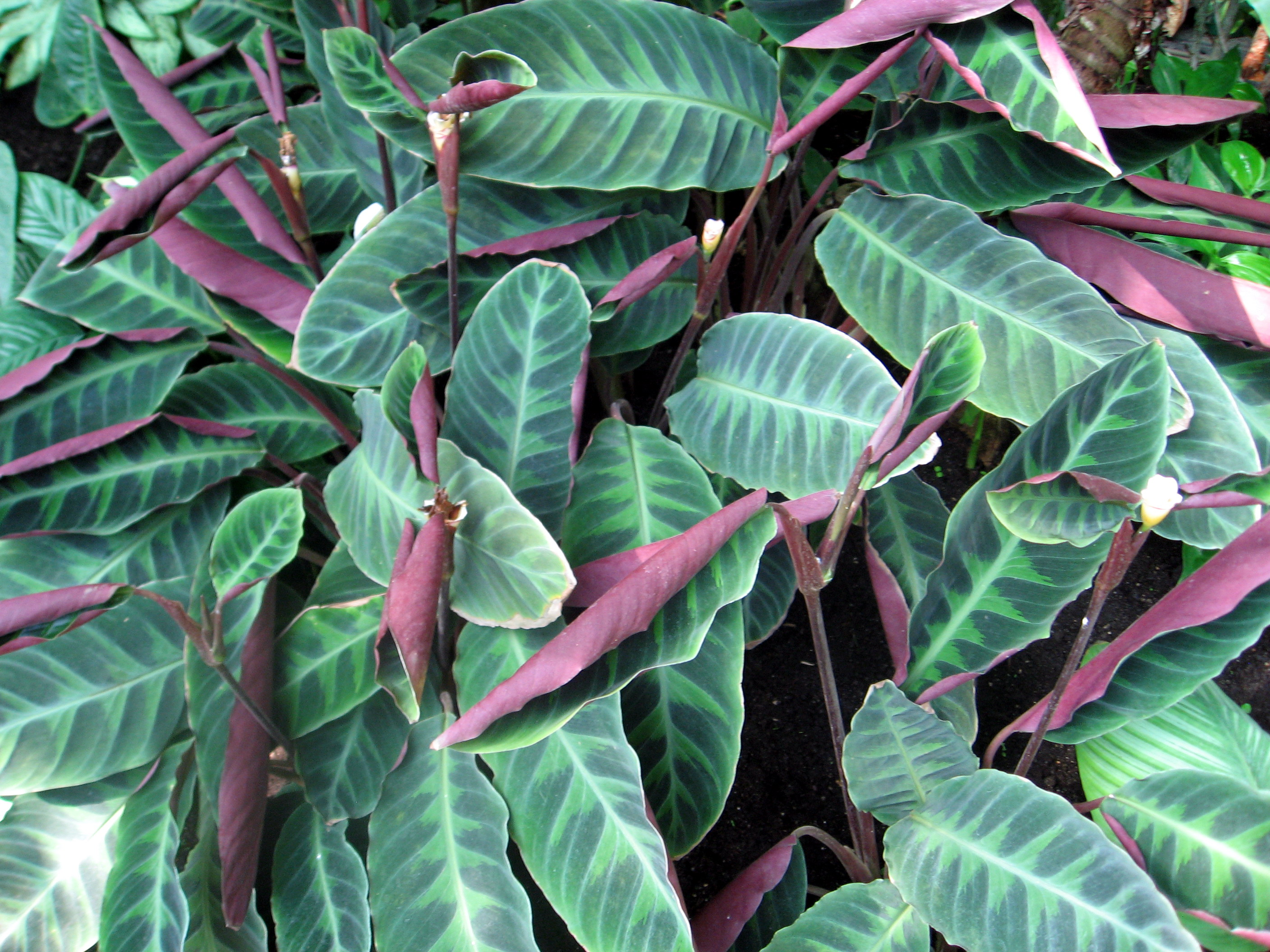 Rostliny ve skleníku zámku v Lednici